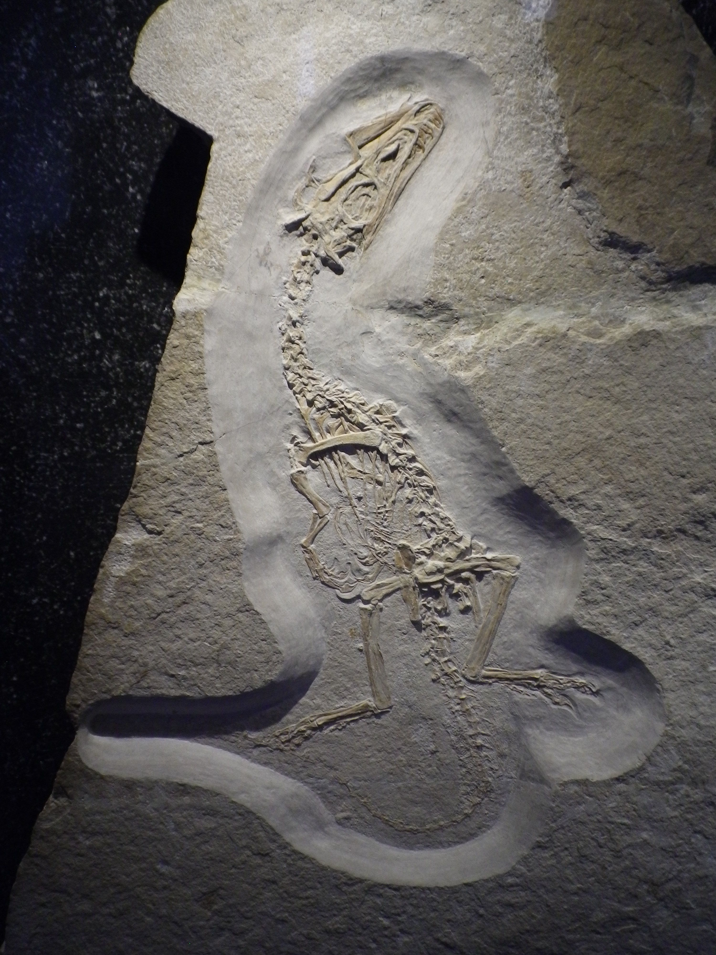 Der Juravenator starki aus Schamhaupten bei Eichstätt